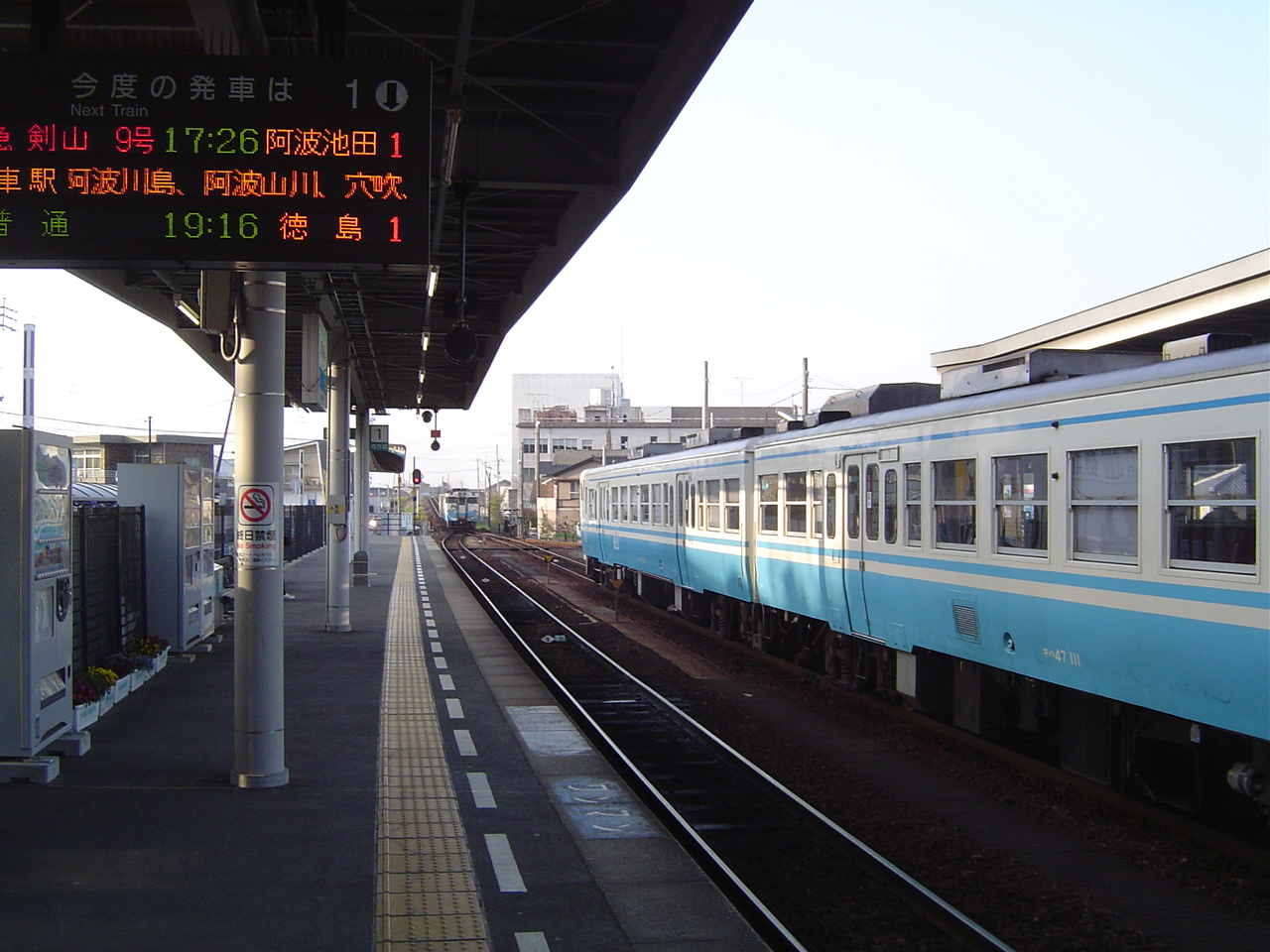 阿南駅ホーム